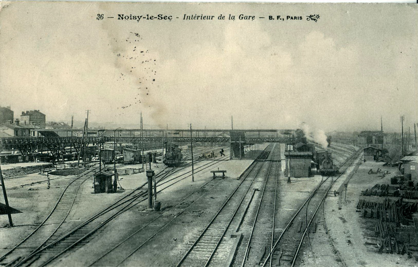 Carte postale ancienne éditée par BF à Paris, N° 36 Noisy-le-Sec : La Gare A gauche, les voies du Chemin de fer de l'Est, au centre, celles de la Grande Ceinture